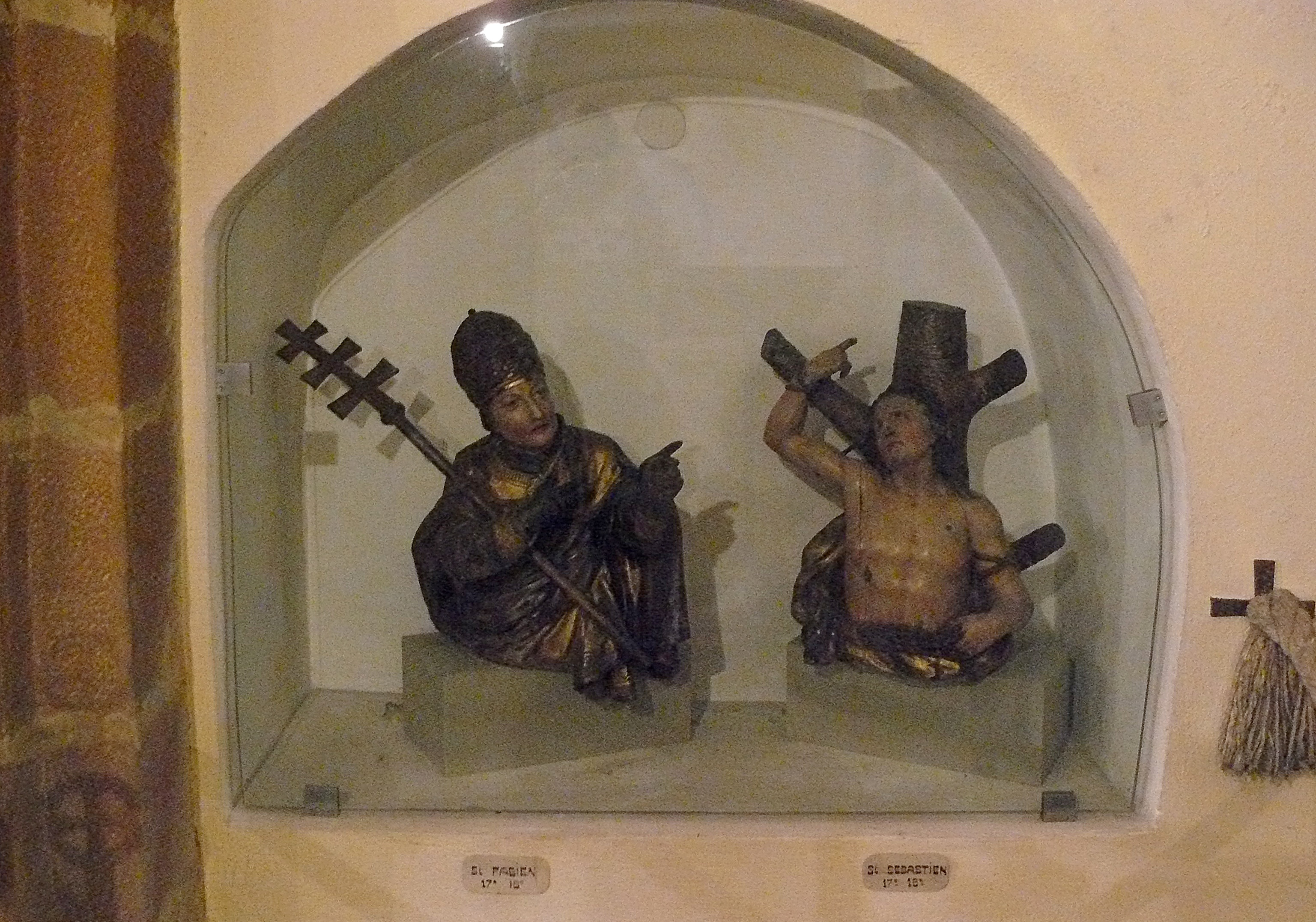 Bustes de Saint-Fabien et de Saint-Sébastien (XVIIe-XVIIIe siècle) se trouvant dans la crypte de l'église Saint-Pierre-et-Saint-Paul